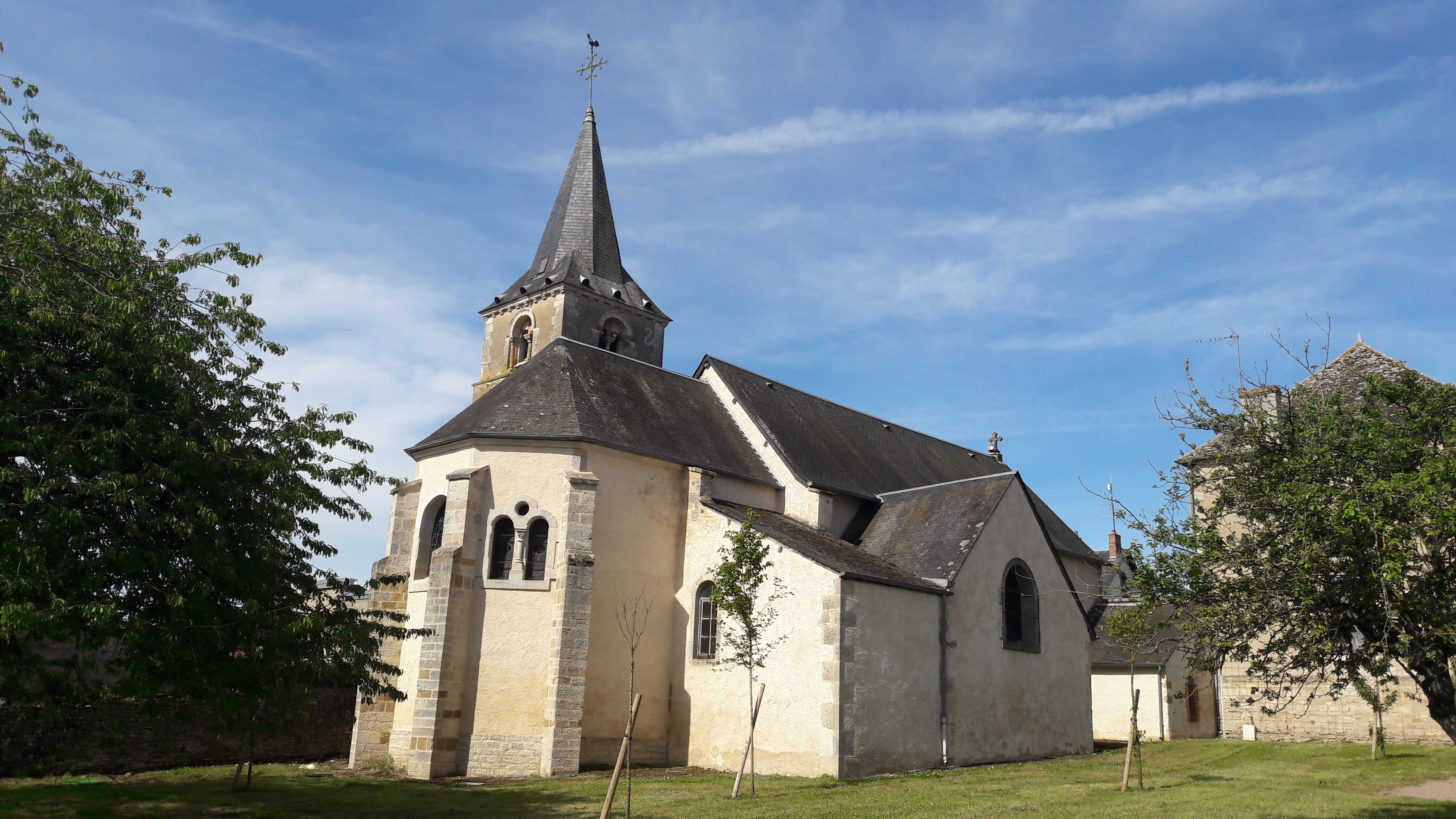 Église romane Saint-Bénigne de Sougy-sur-Loire